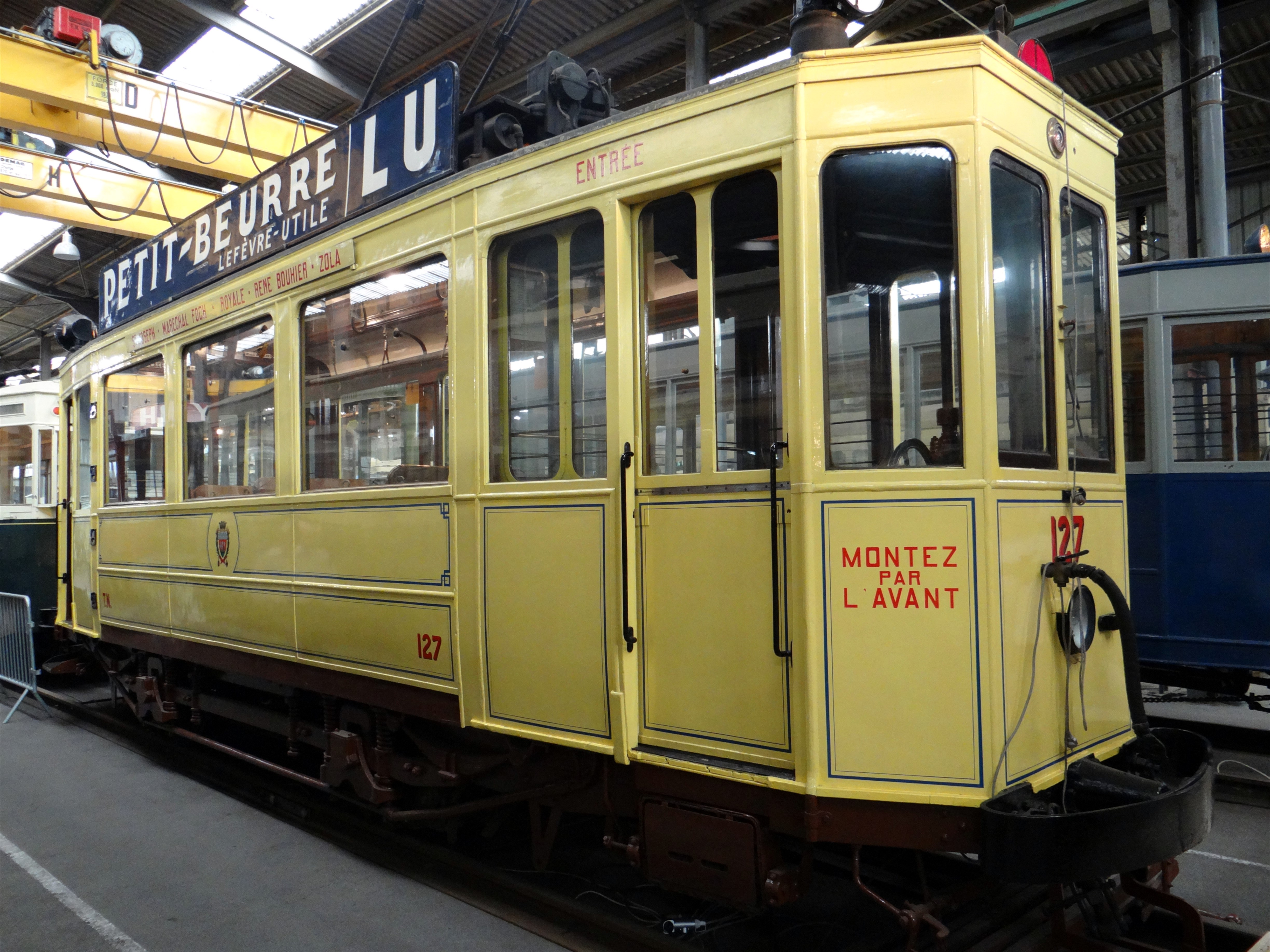 Motrice N°127 (série de 80 motrices) de 1914 du réseau urbain de Nantes. Musée des transports urbains, interurbains et ruraux, Chelles, Seine-et-Marne, France.